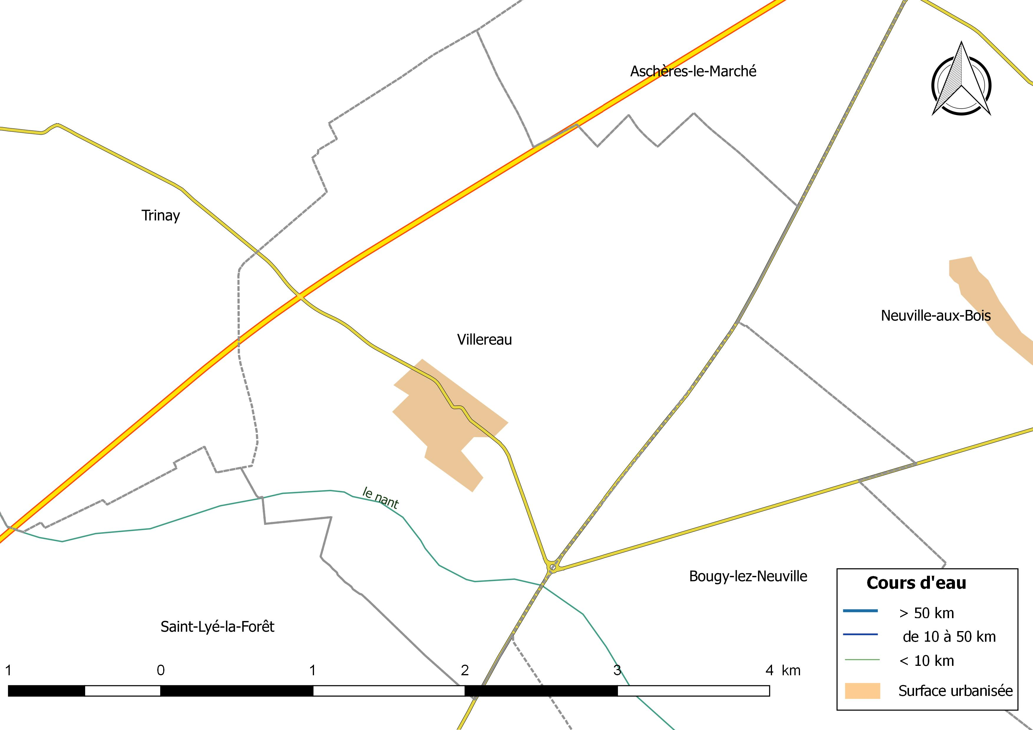 Carte du réseau hydrographique de la commune de Villereau (Loiret) (France).